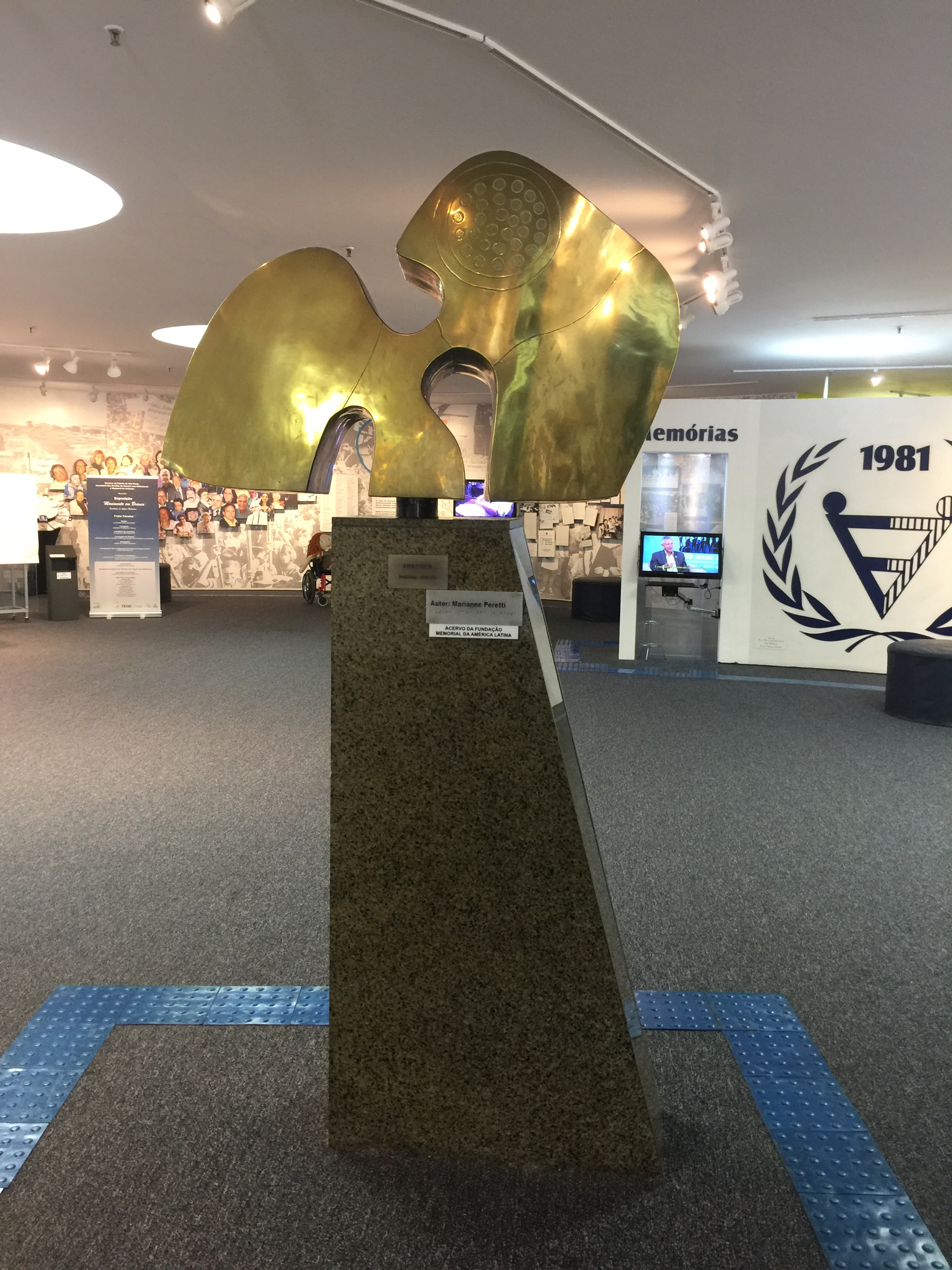 Obra do acervo da Fundação Memorial da América Latina de Marianne Peretti